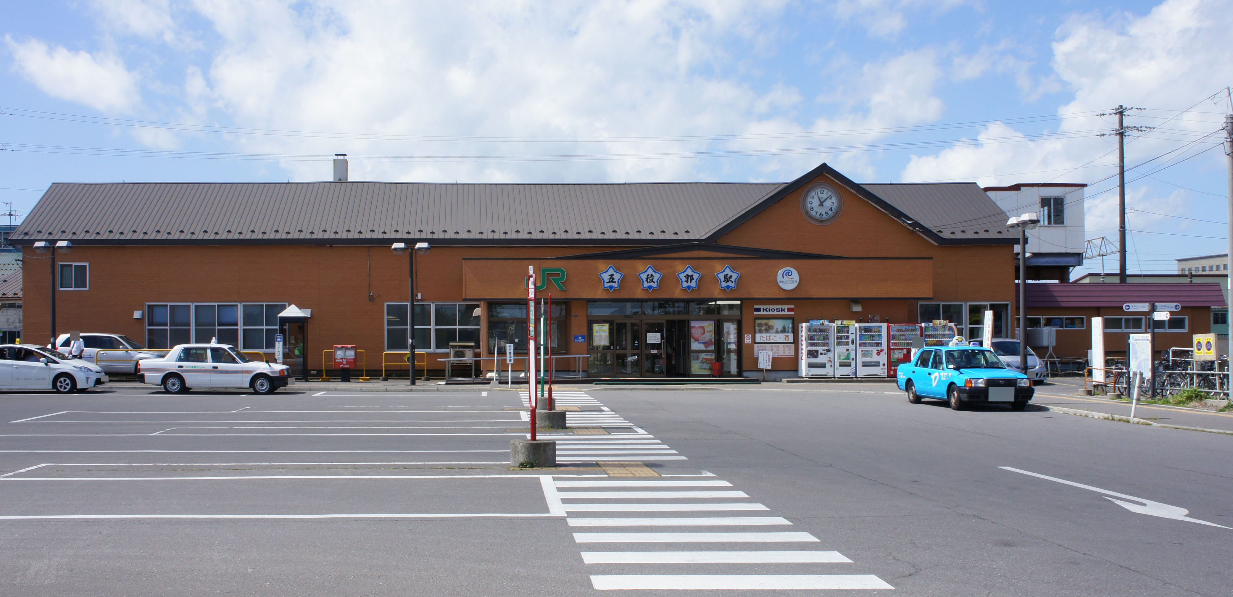 五稜郭駅の駅舎 Sony NEX-3